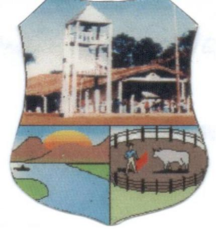 Insignia del distrito de Laureles - Ñeembucú